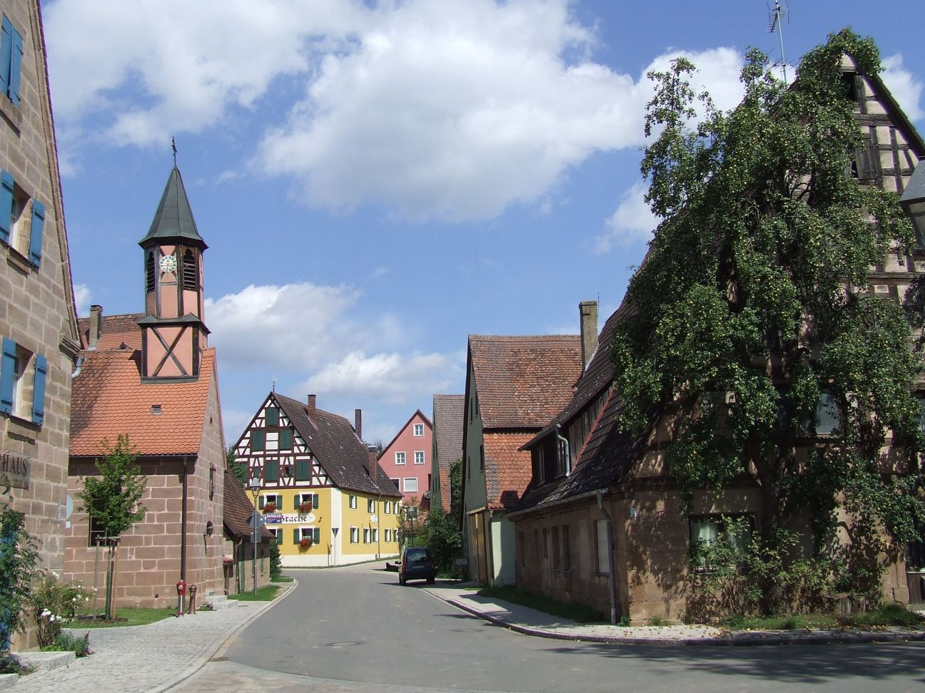 Mosbach (Stadt Spalt, Landkreis Roth, Mittelfranken, Bayern, Deutschland)